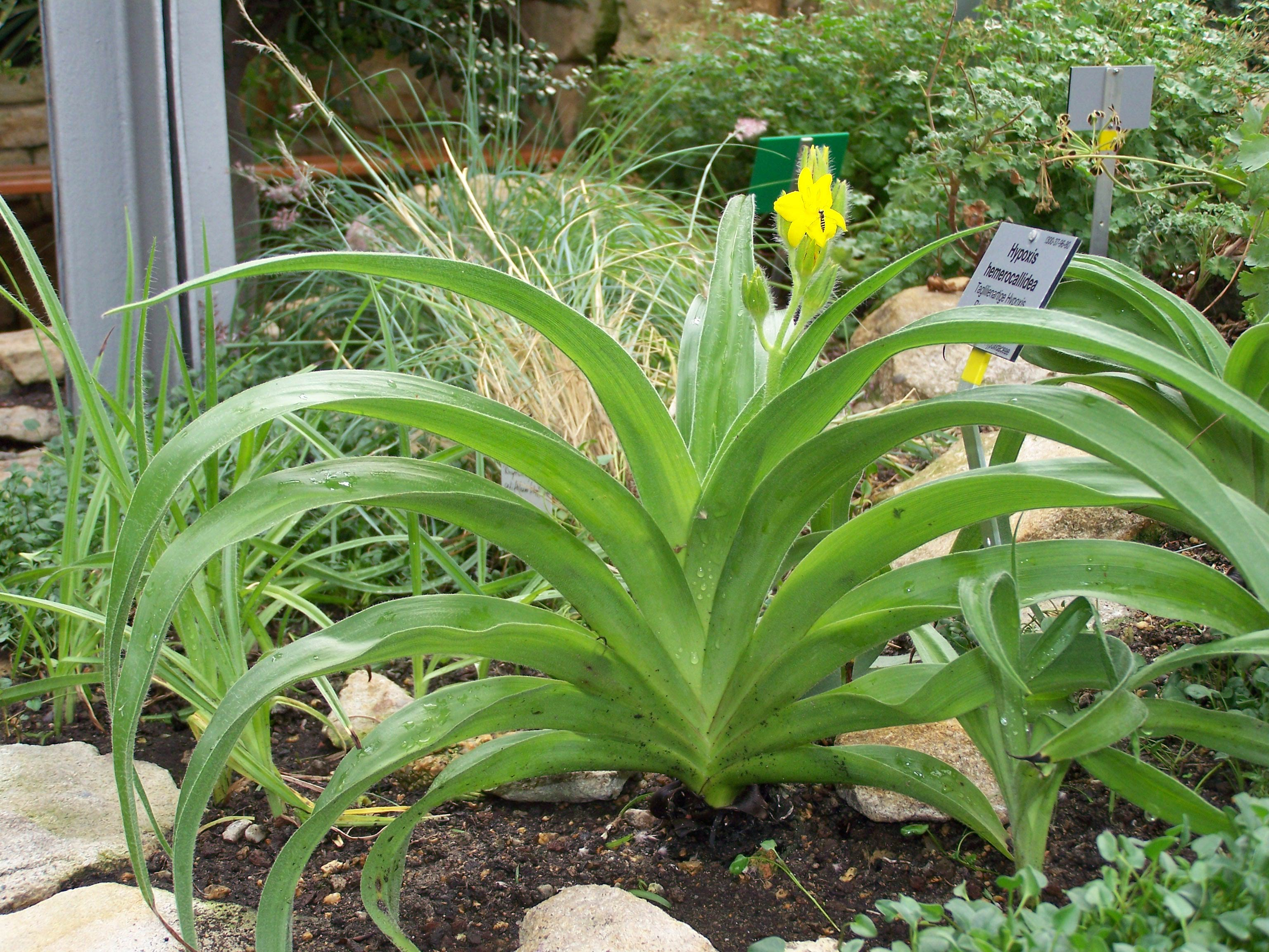 Taglilienartige Hypoxis (Hypoxis hemerocallidea), Botanischer Garten Berlin